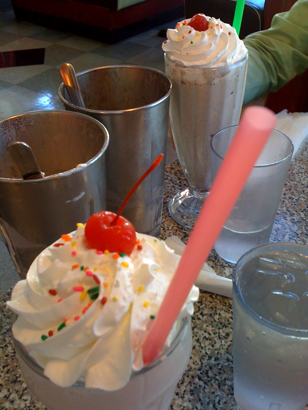 milkshakes at mel's